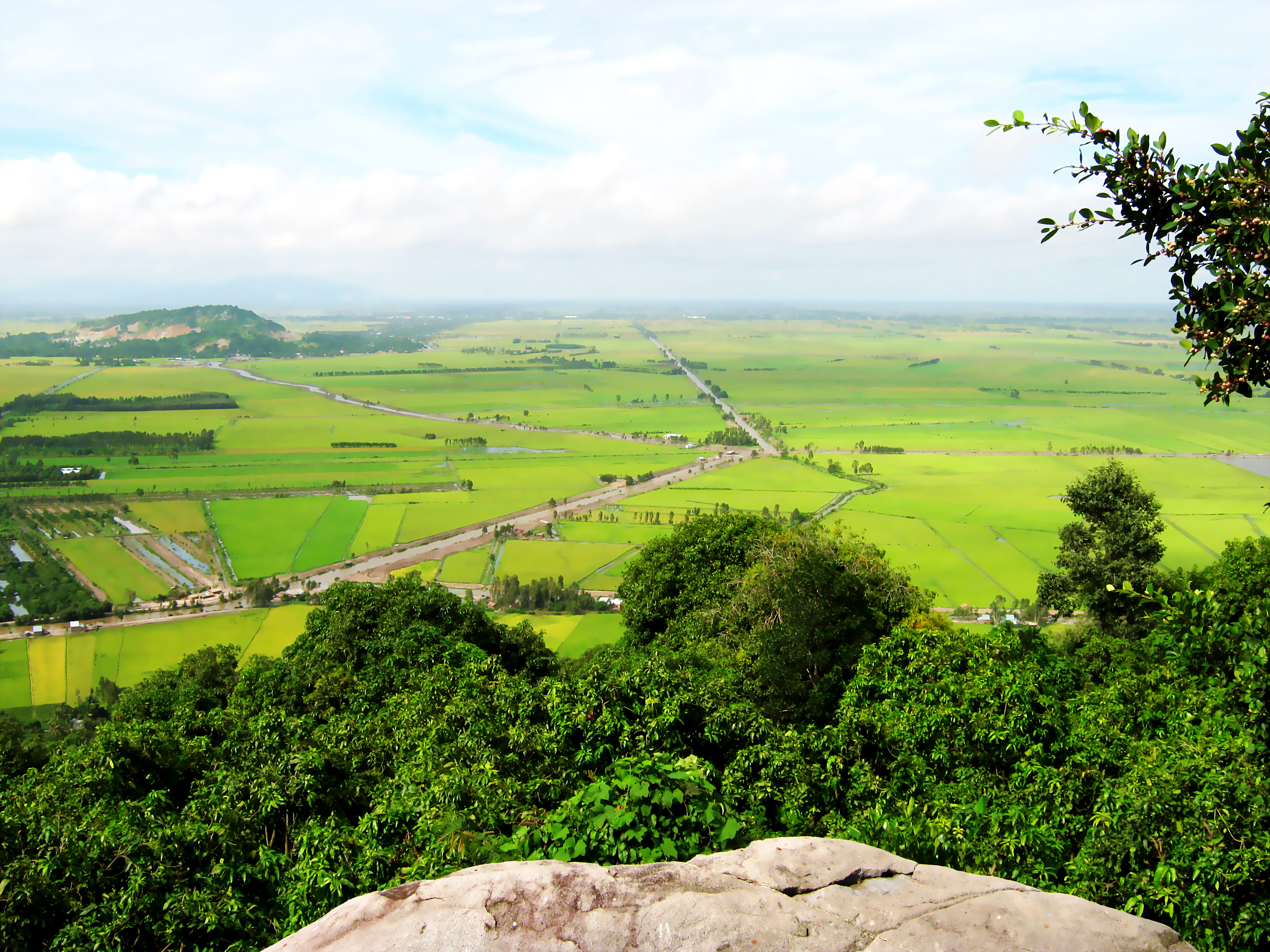 Một cánh đồng trồng lúa rộng lớn tại Hòn Đất, thuộc tỉnh Kiên Giang, Việt Nam.